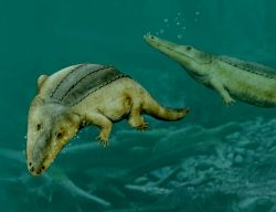 Mastodonsaurus